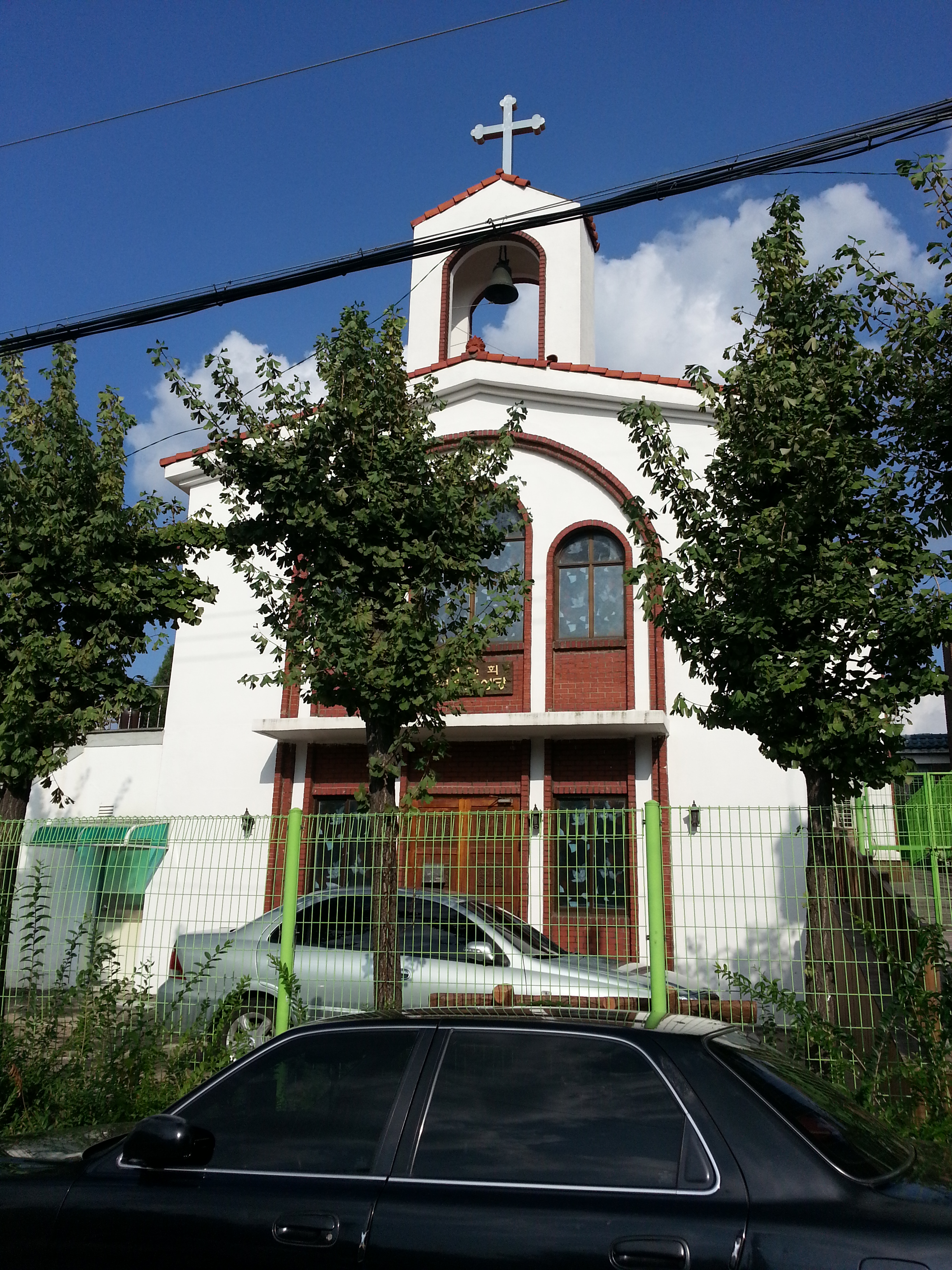 仁川聖パウロ聖堂正面